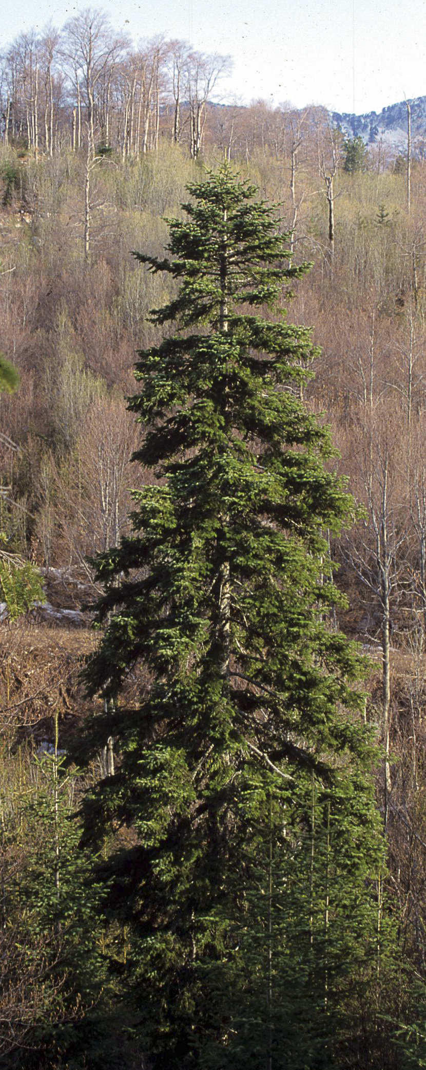 Alte Tanne im Orjen, Montenegro)